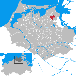 Preetz in Mecklenburg-Vorpommern - District Nordvorpommern